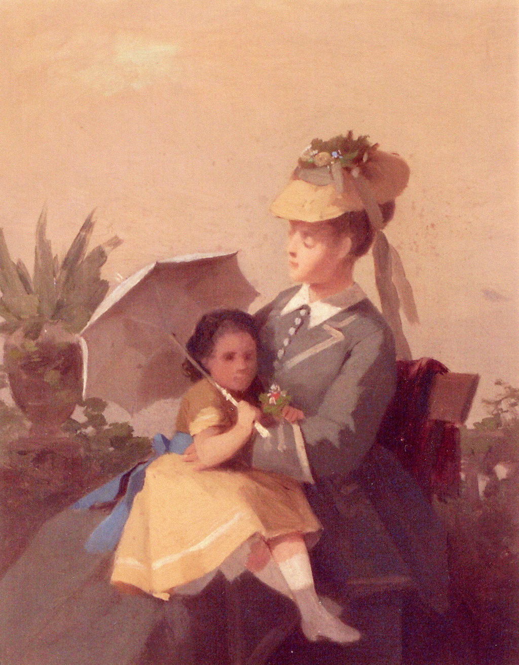 Id. Vastagh György: Sephine és Izi (Kolozsvár)